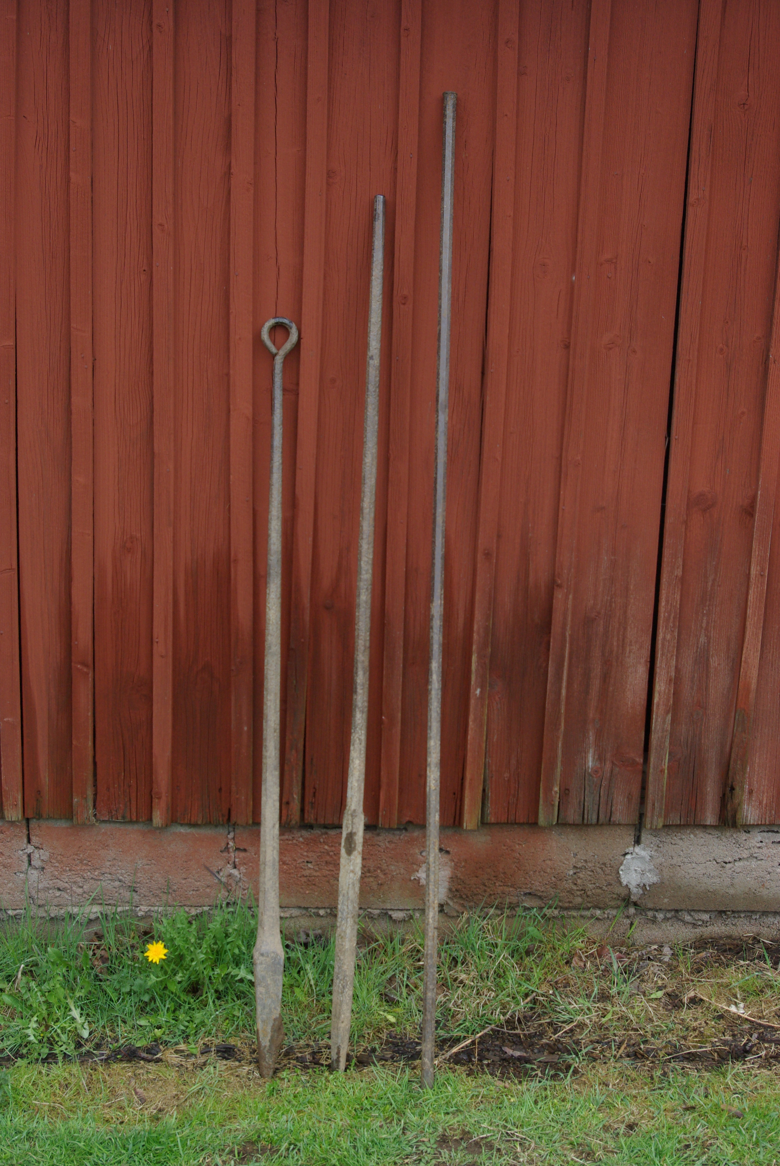 Exempel på tre olika järnspett. Till vänster en såkallad "Stör", som är avsedd att sätta ner stängselstör i marken. I mitten ett standardbetonat järnspett. Till höger ett smalt järnspett för att bryta sten med.